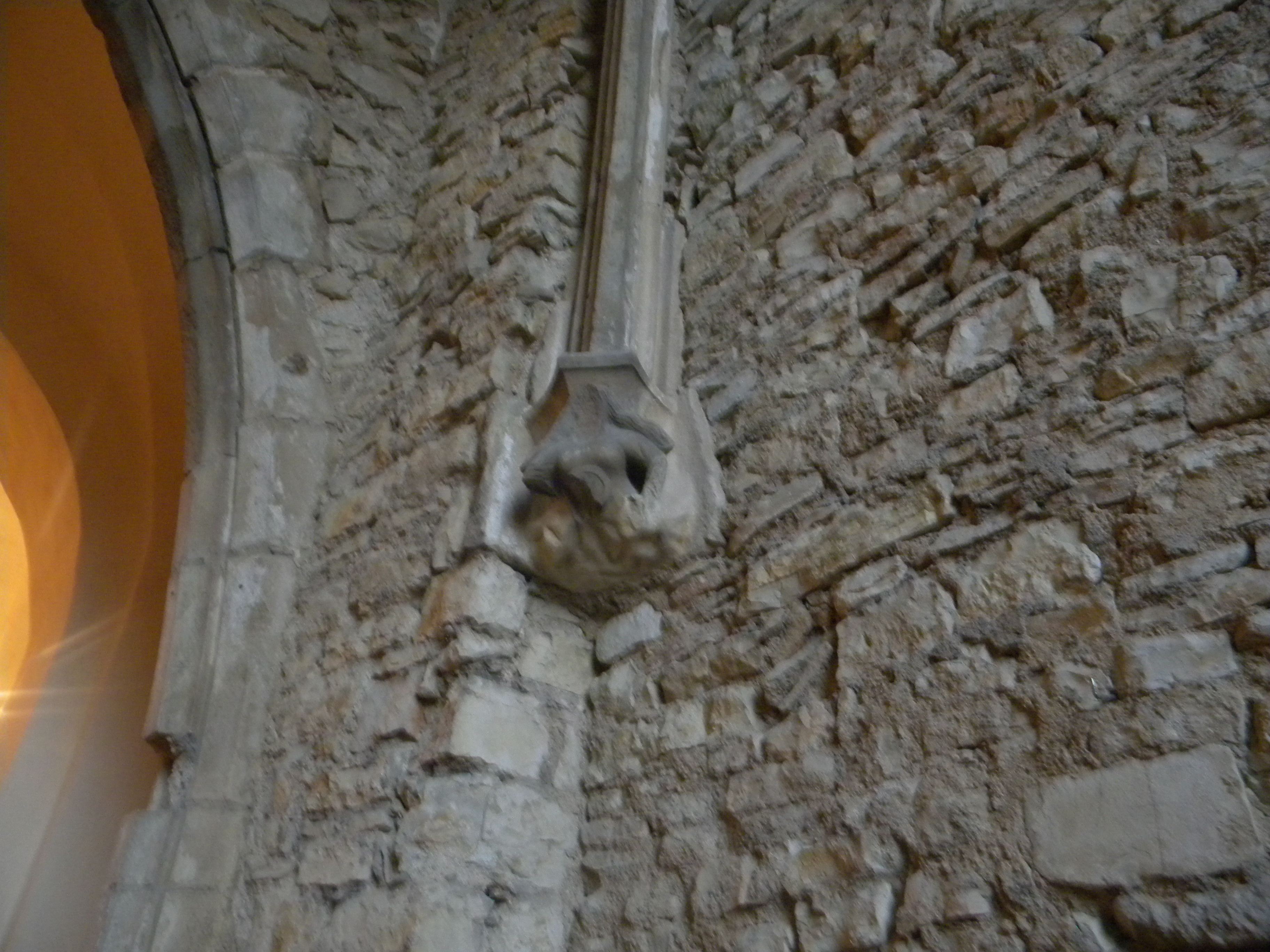 Virinobuston en Sankta Marteno (LAIVES°